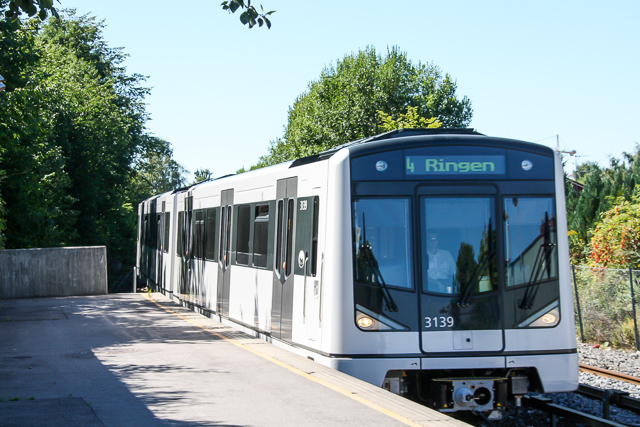 T-banen i Oslo. Et MX3000 tog ruller inn på Ullevål Stadion stasjon